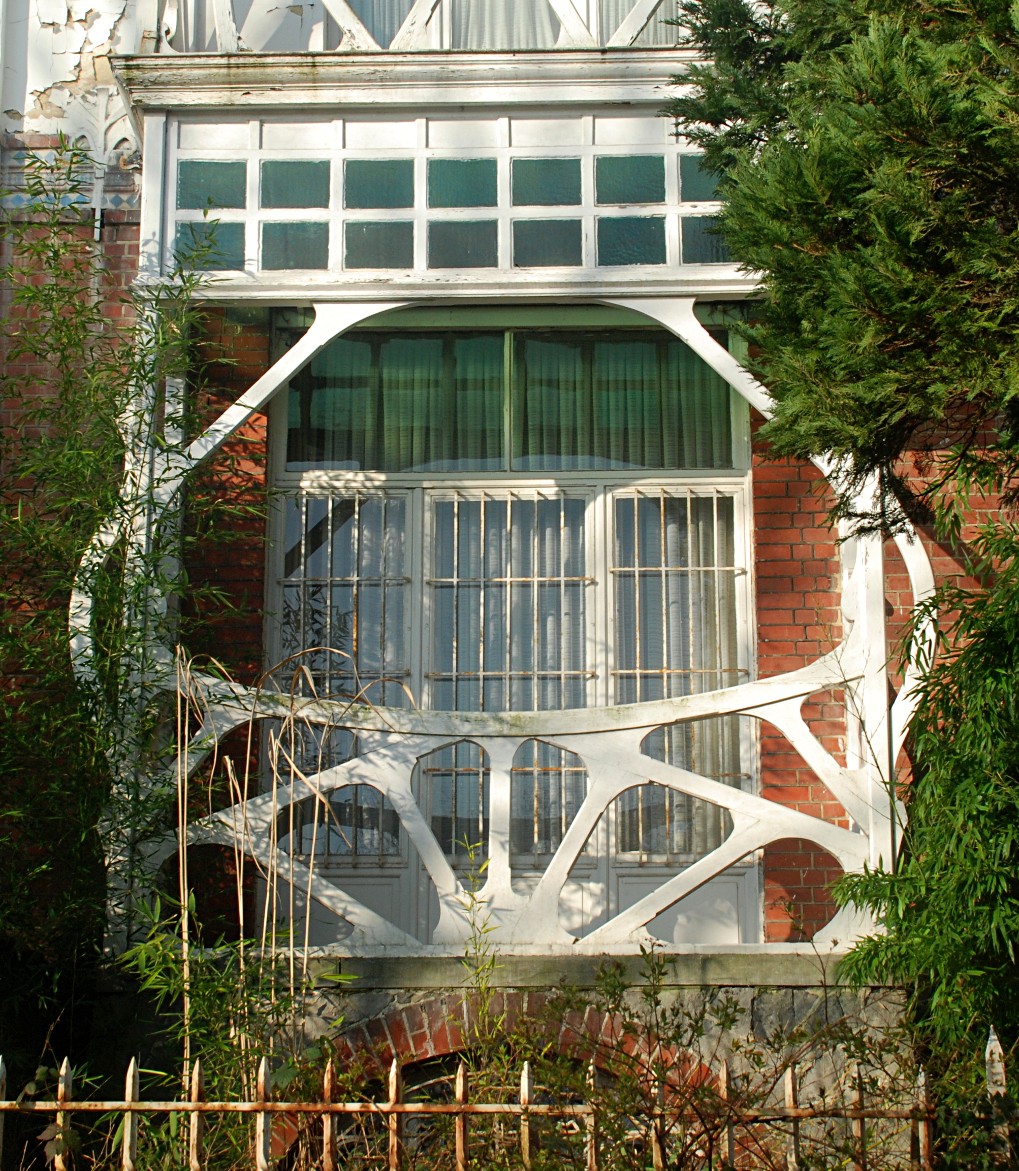 Belgique - Bruxelles - Watermael - William Jelley - Villa Art nouveau - Avenue des Taillis 11 - Balcon